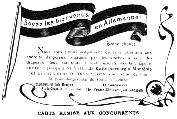 Paris-Berlin 1901, carte de bienvenue aux concurrents, Histoire de l'automobile, Pierre Souvestre, éd. H. Dunod et E. Pinat, 1907 (ASIN B001BPBE58) p.524